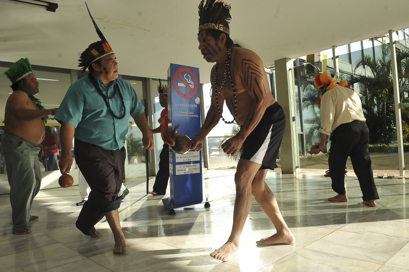 Brasília - Indígenas dos povos Kaingang, Guarani Mbyá e Charrua, do Rio Grande do Sul e Santa Catarina, ocupam a entrada e o 4º andar do Ministério da Saúde, na Esplanada dos Ministérios, onde estão instalados os escritórios da Secretaria Especial de Saúde Indígena (Sesai)